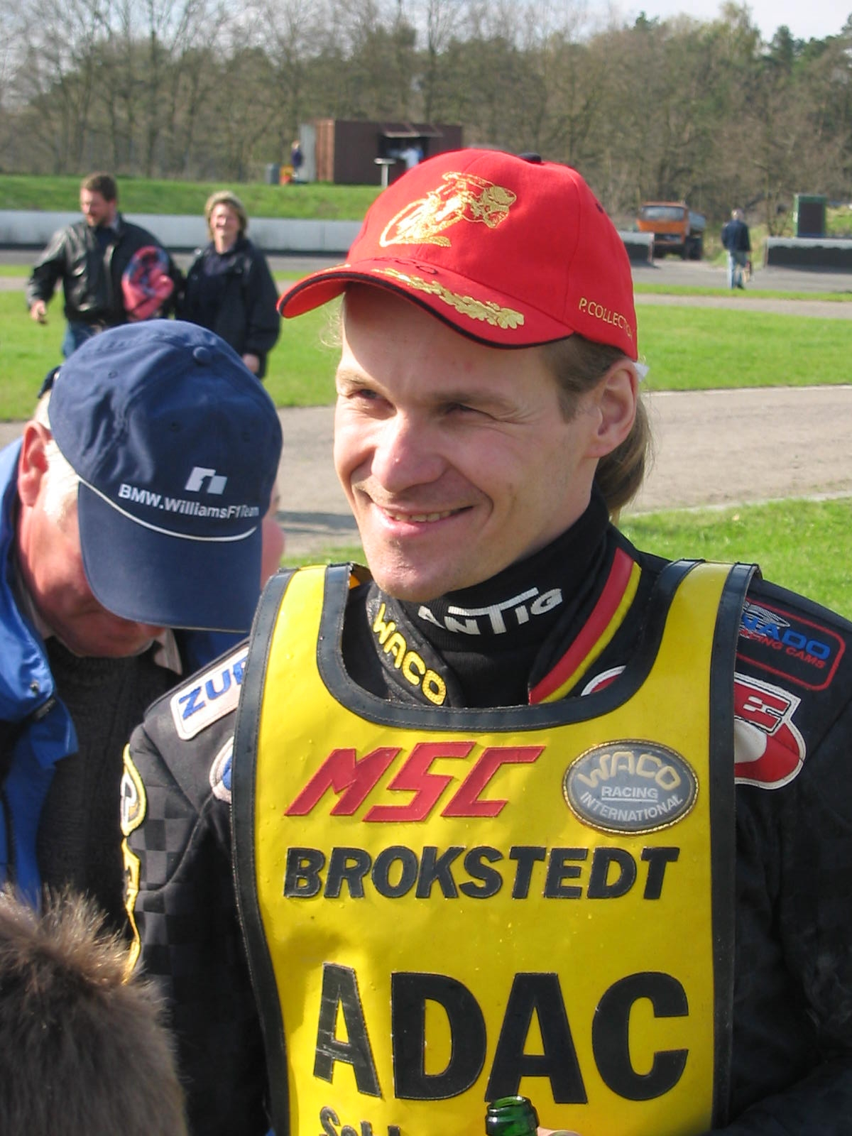 Matthias Kröger, deutscher Bahnsportprofi aus Bokel (Kreis Pinneberg)